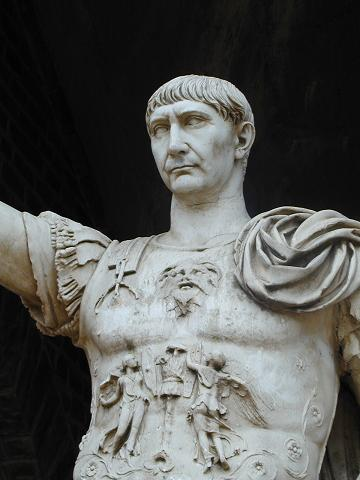 Trajan, Xanten; Nachbildung